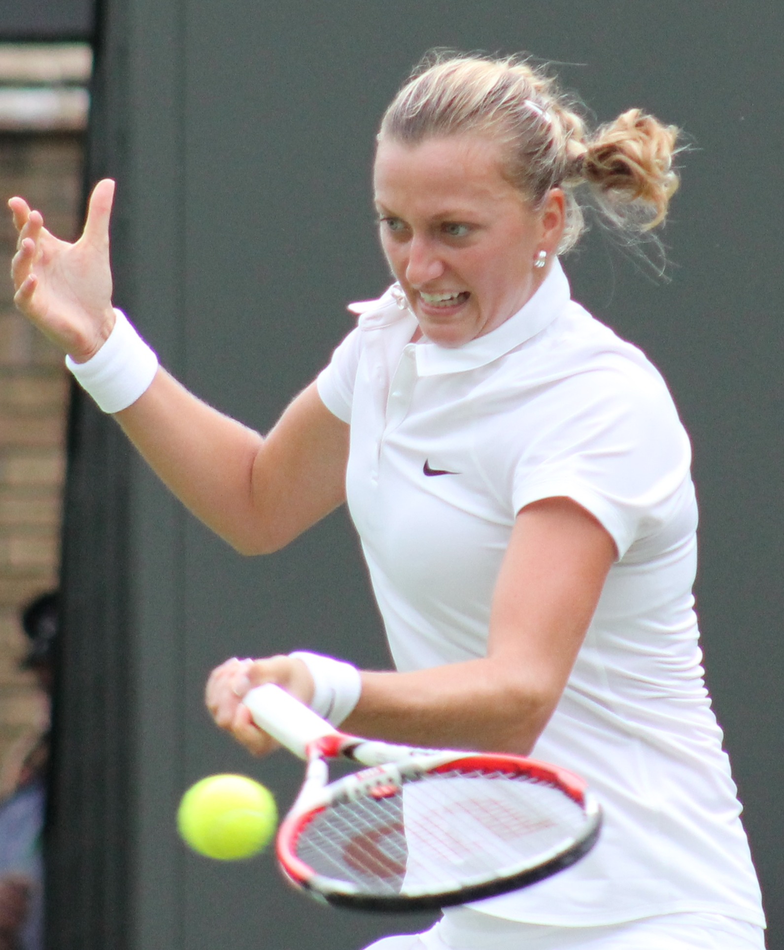 Kvitova WM14 (7)